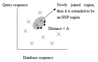 BLAST中製作字組表的方法